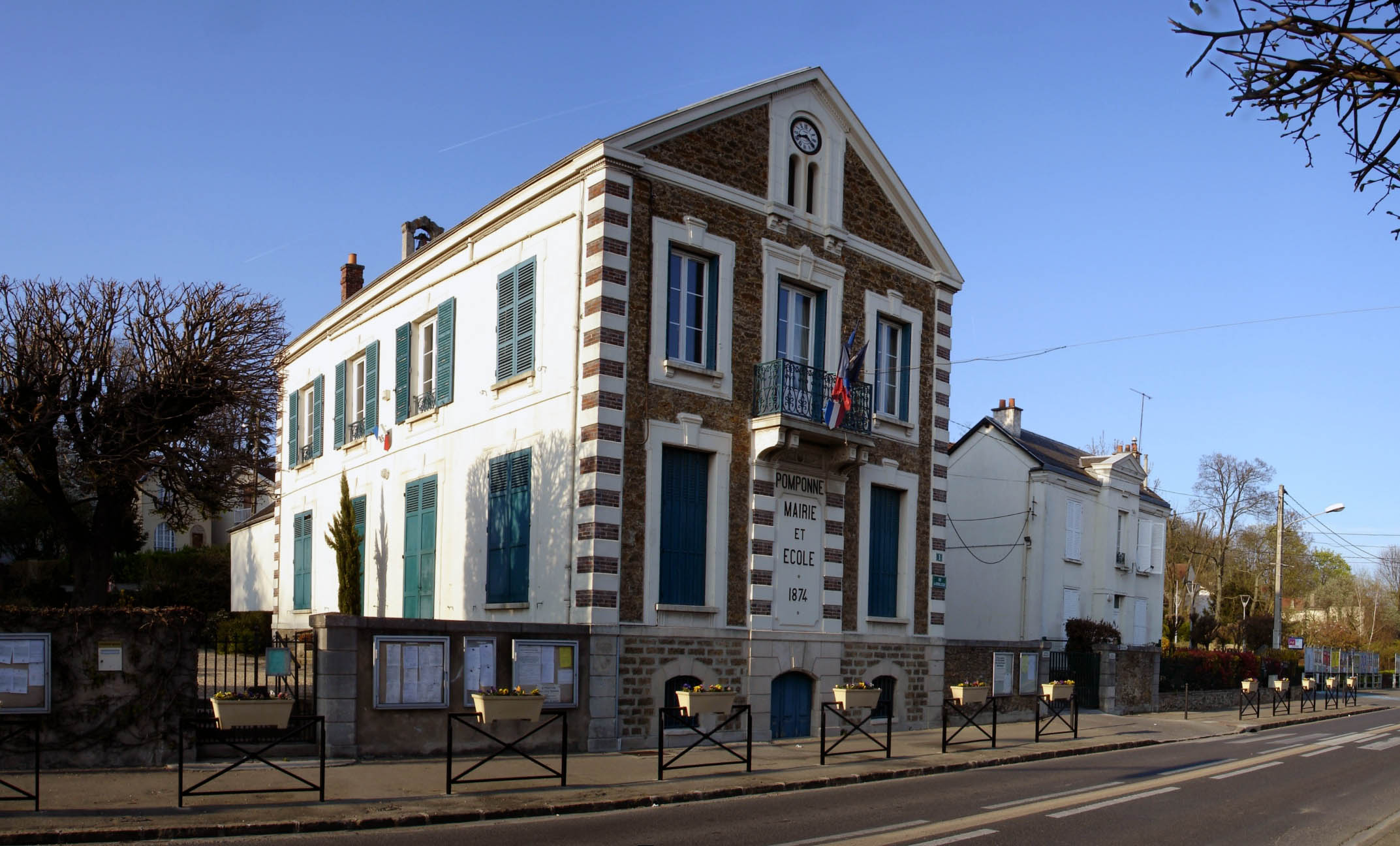 Mairie de Pomponne (Seine-et-Marne), France